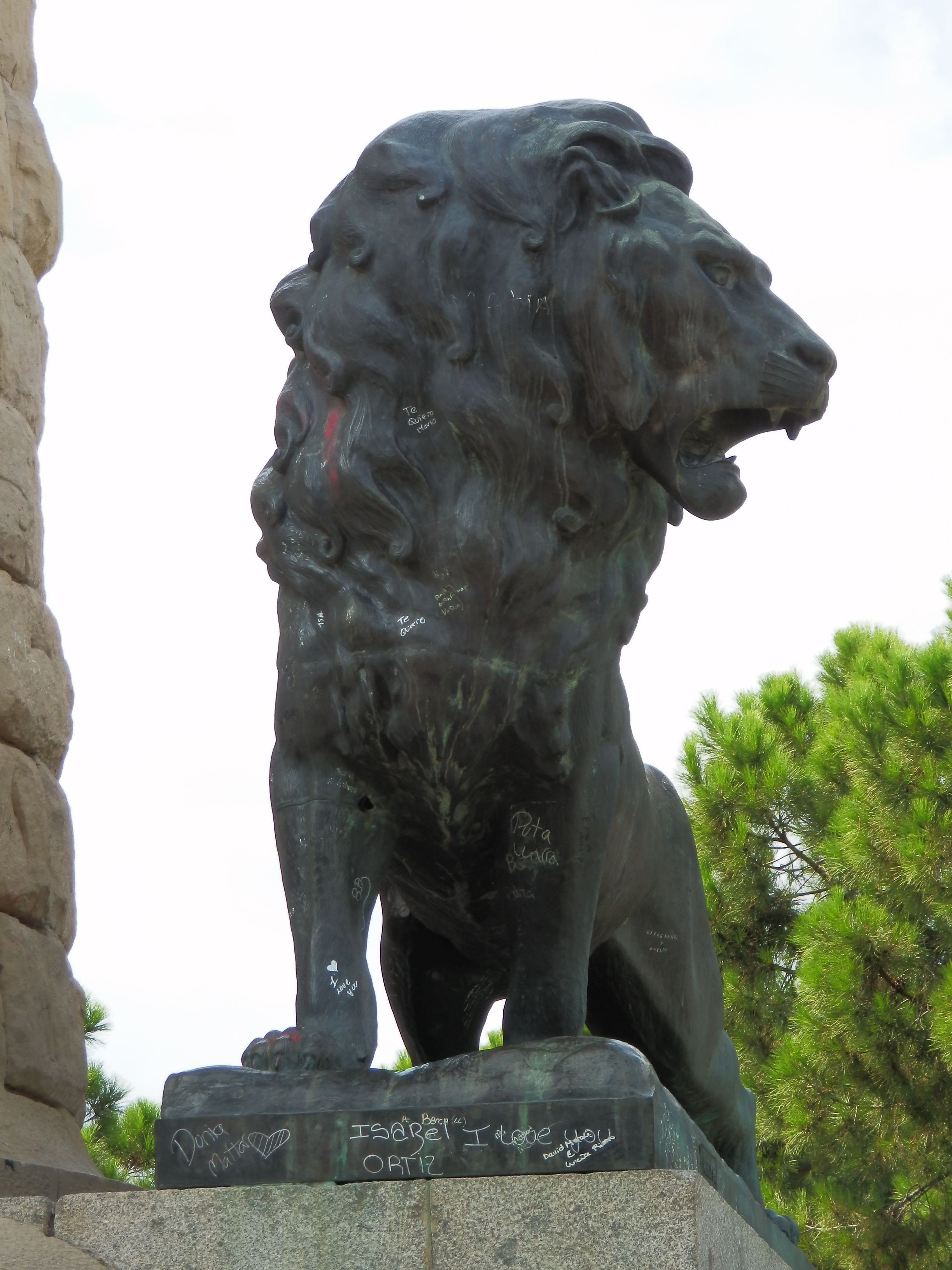 Escultura de león en el monumento al rey Alfonso I el Batallador. Realizada por Virgilio Garrán Rico.